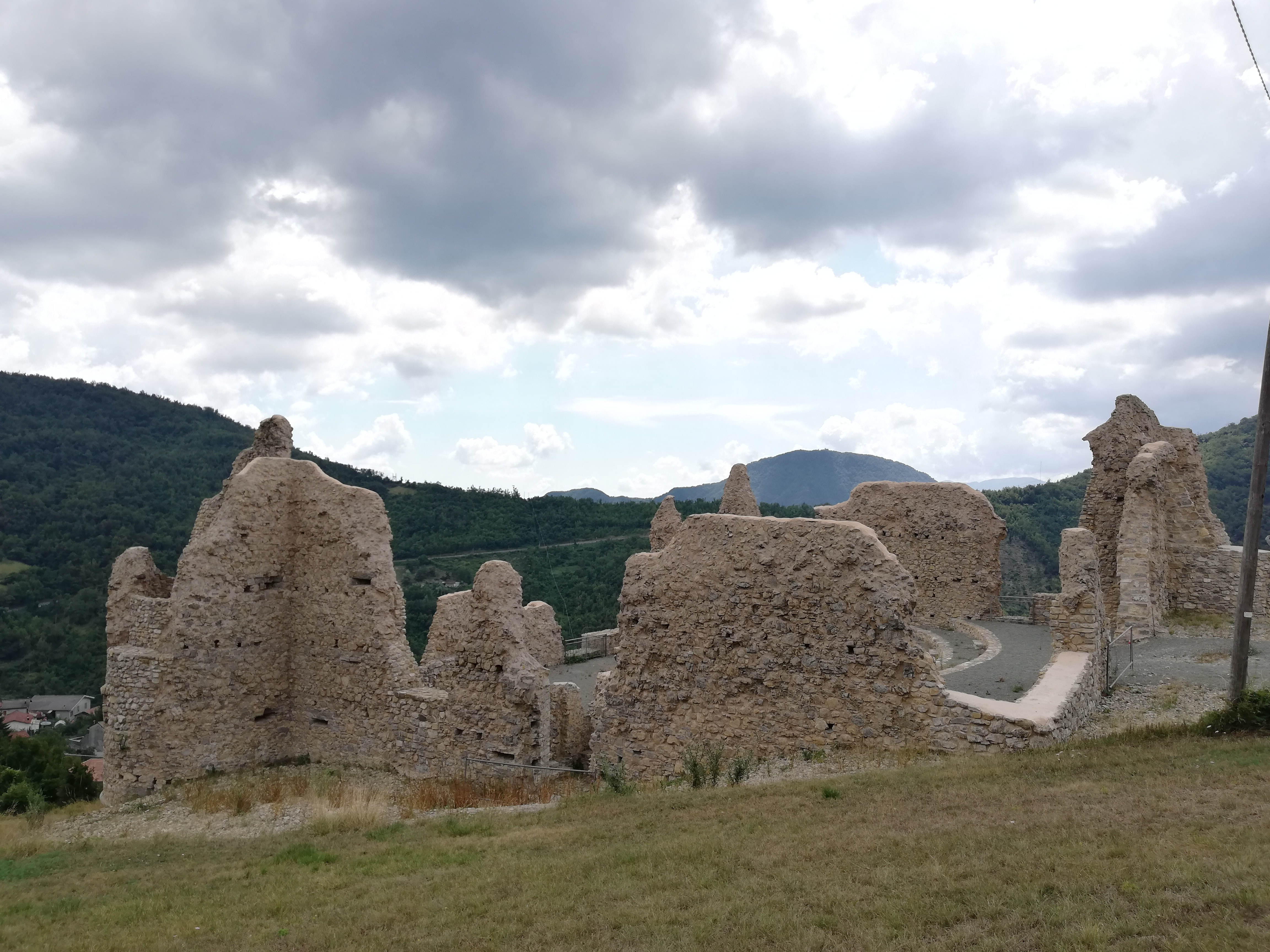 Vista dall'esterno del castello di Montessoro(lato est)